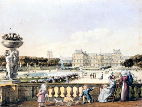 Le jardin du Luxembourg par Christophe Civeton (1796-1831). Dessin à la plume et encre de Chine, aquarelle et rehauts de blanc, 16,1 x 21,3 cm.